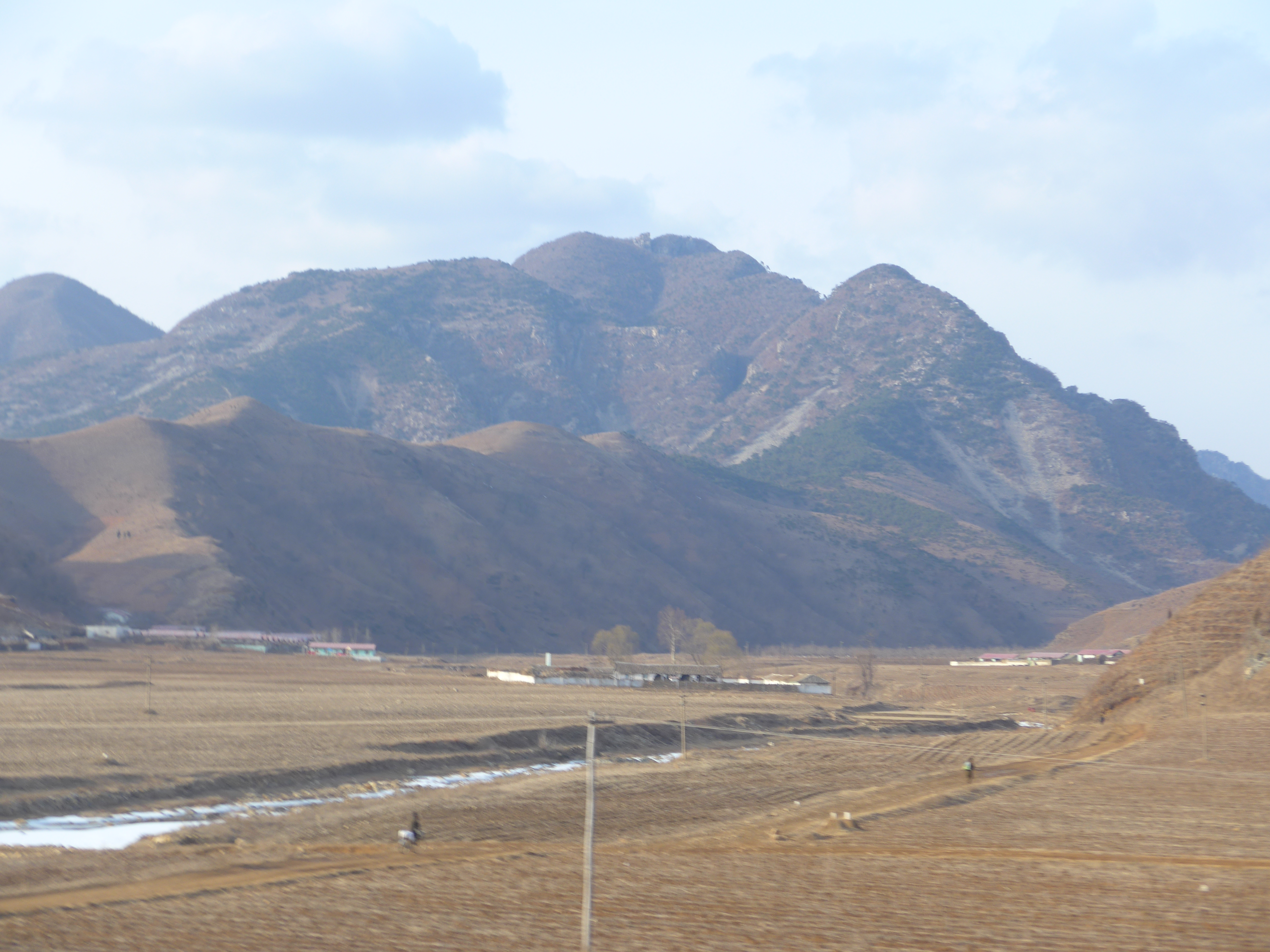 Pyongyang - Kaesong Hwy, North Hwanghae, North Korea